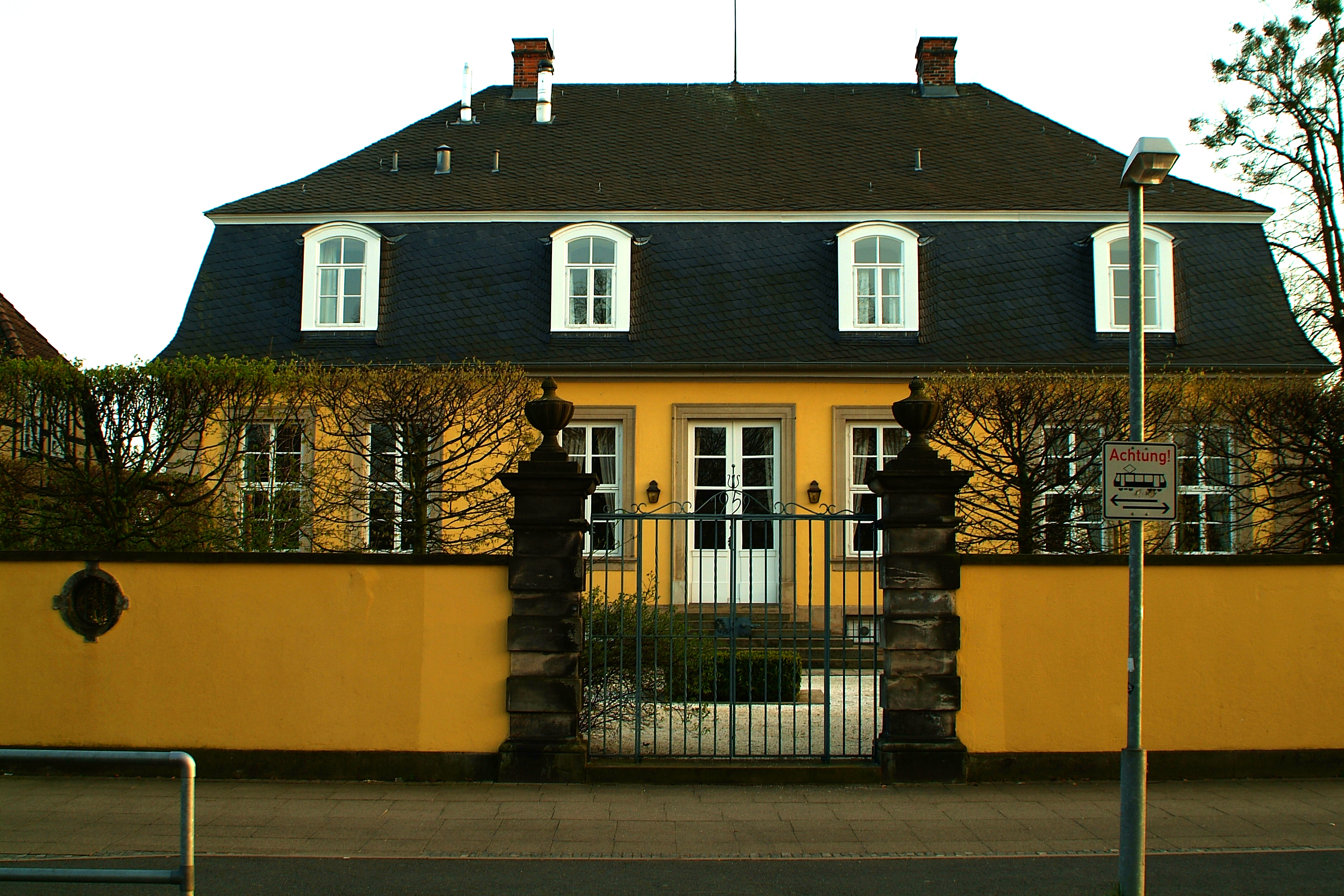 Hardenbergsches Haus in Hannover, Blick von der Nordseite (Stadtbahnhaltestelle Schaumburgstraße) durch das geschlossene Tor.